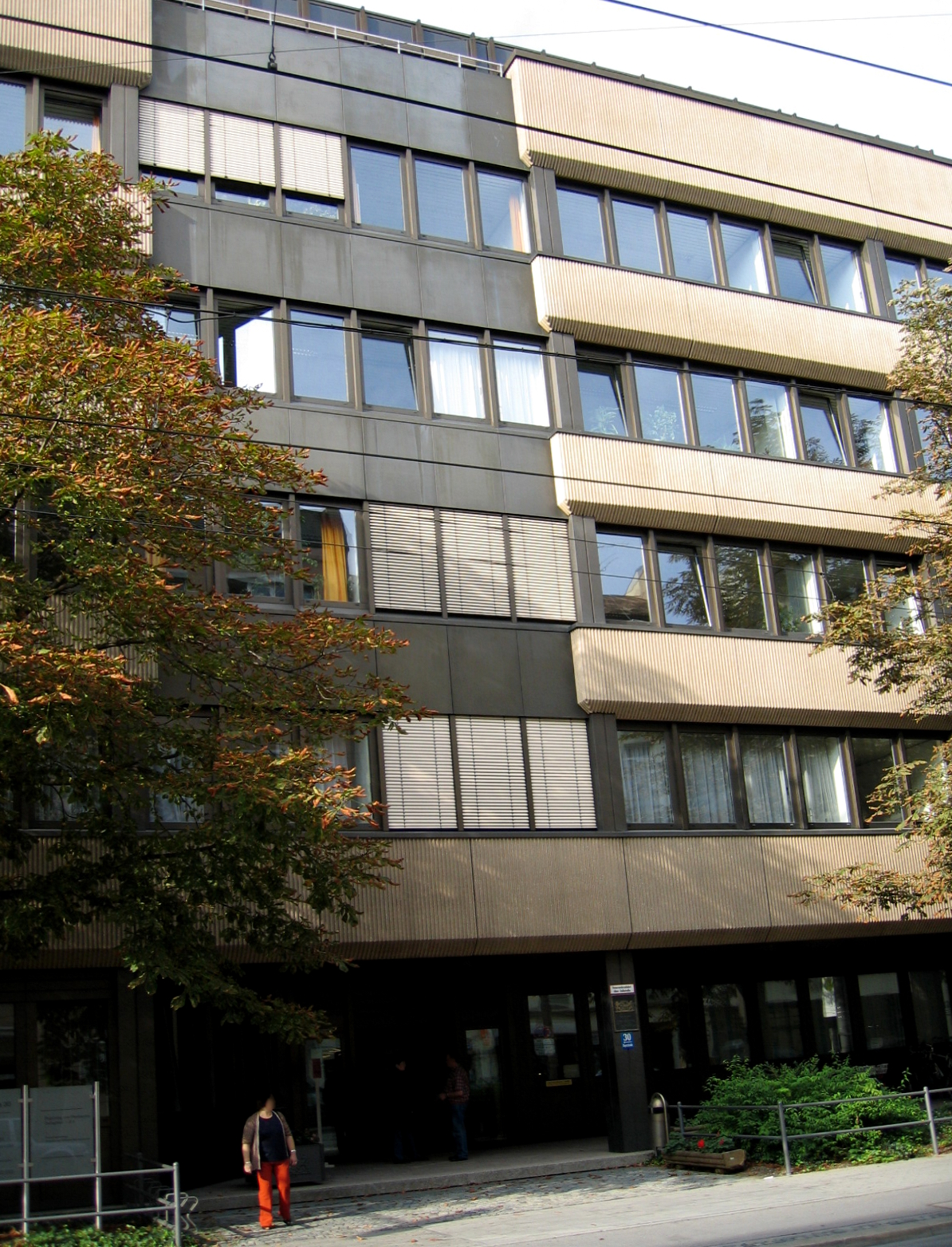 Description: Gebäude des Verwaltungsgerichtes, Bayerstraße 30 in München (Germany) Source: selbst fotografiert Date: 14. Sept. 2005 Author: Bubo